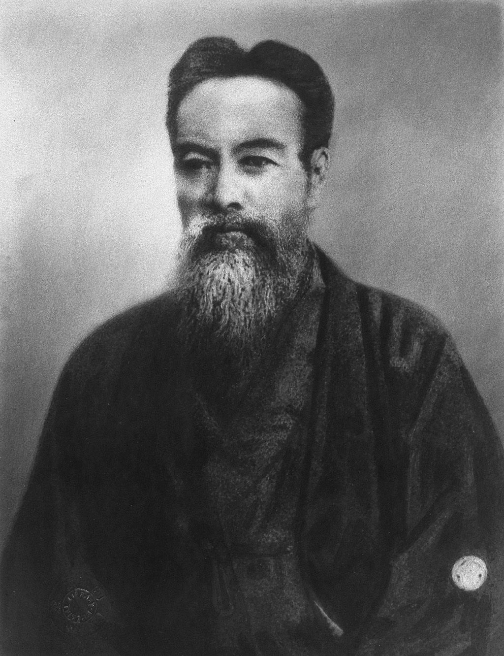 Portrait of Yamaoka Tetsutaro (山岡鉄太郎, 1836 – 1888)